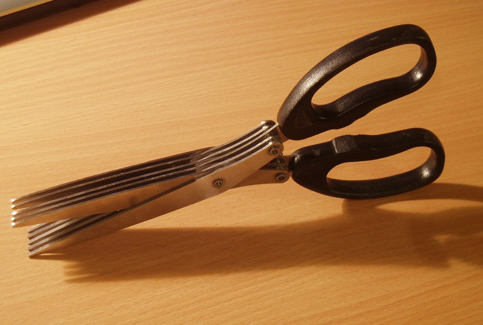 Shredder Scissors